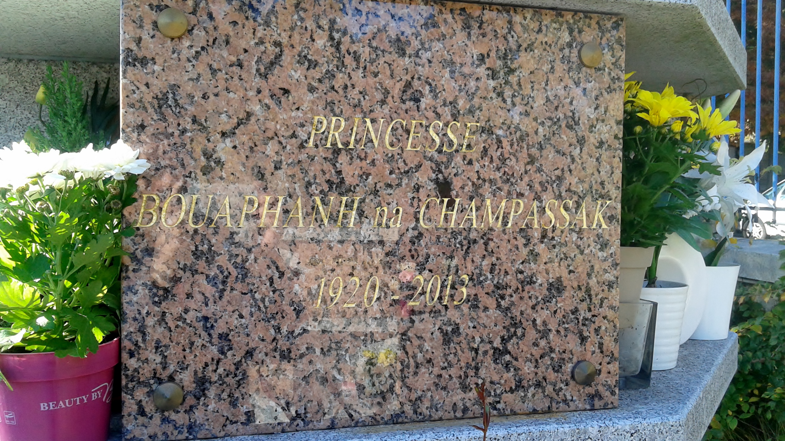 Plaque du colombarium du cimetière de Trivaux (Meudon, 92) de la princesse Bouaphanh.